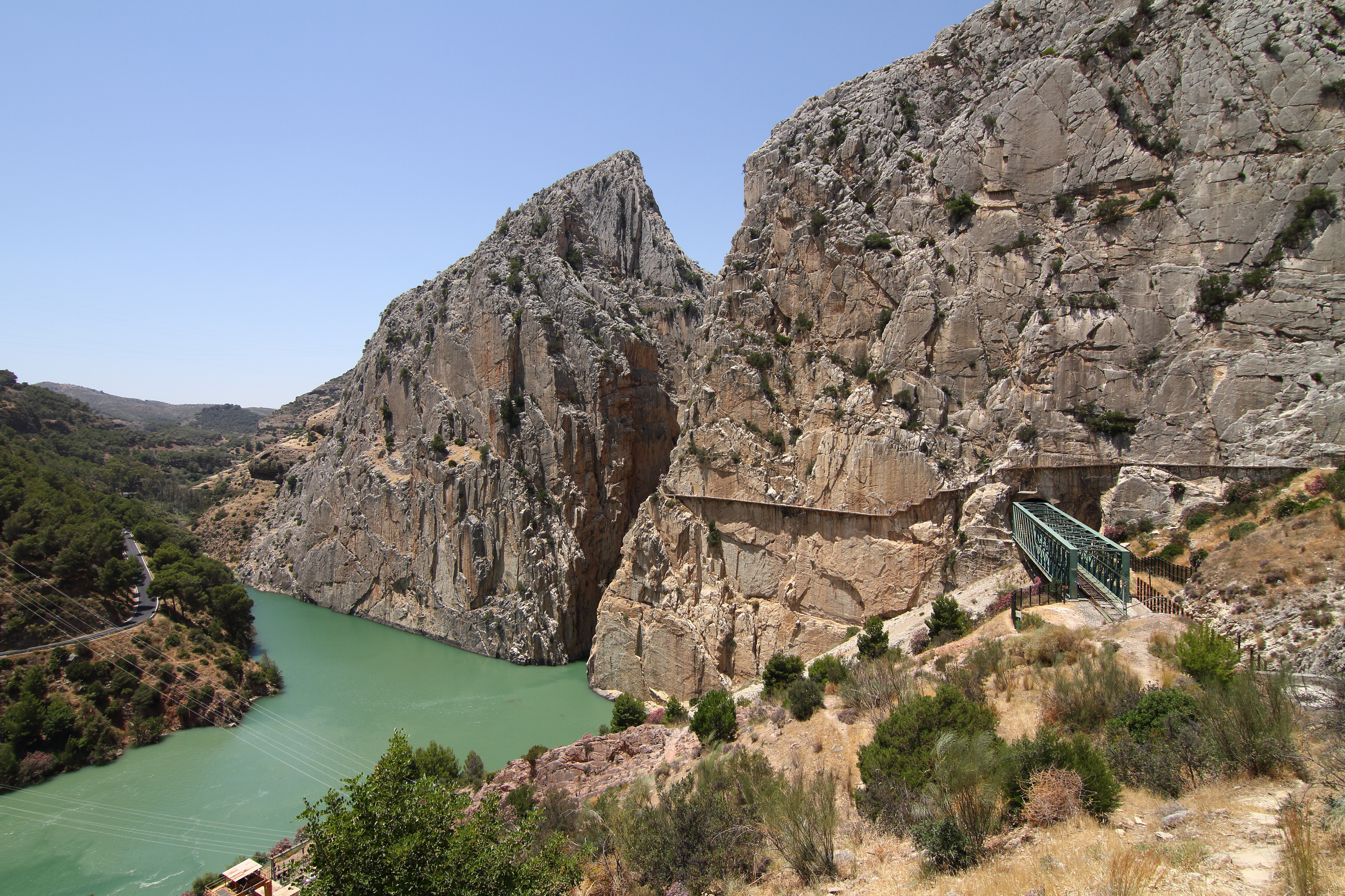 Caminito del Rey, salida sur, desfiladero del Gran Gaitán